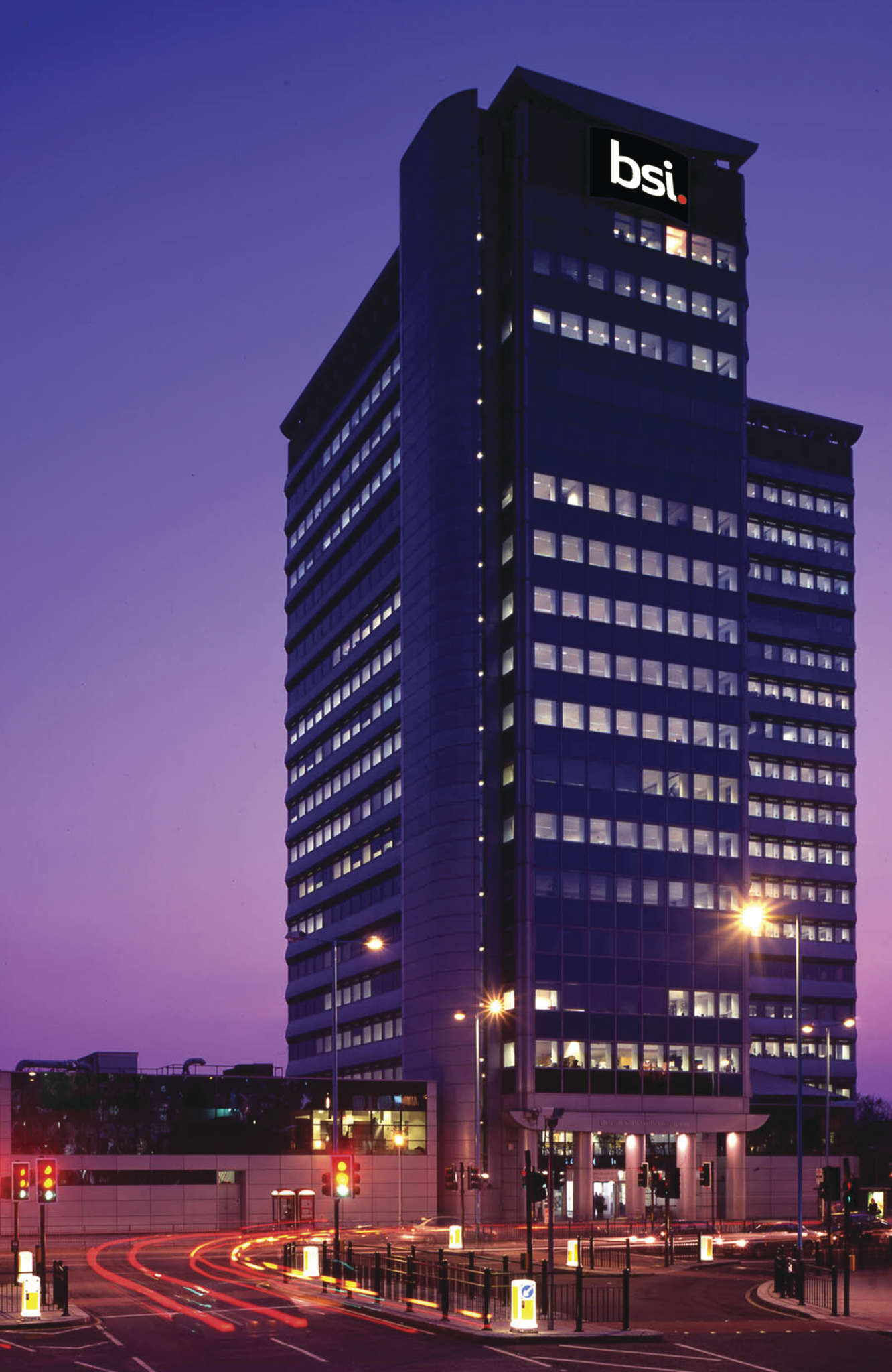 Budynek BSI Group w Chiswick, Londyn, Wielka Brytania